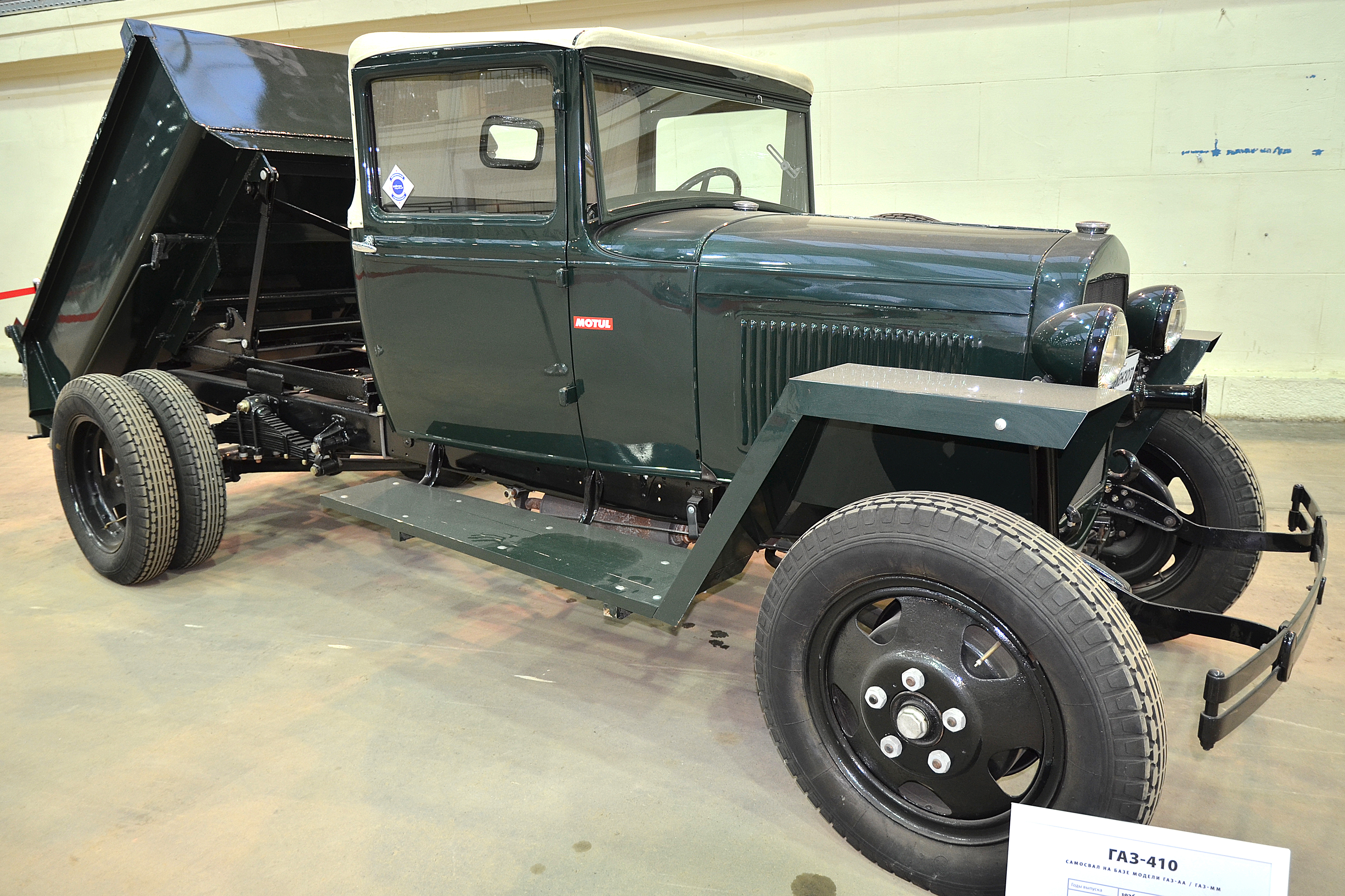 Можно увидеть здесь : You can see here